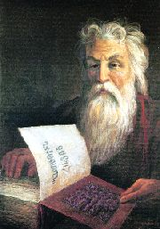 Մովսես Խորենացի